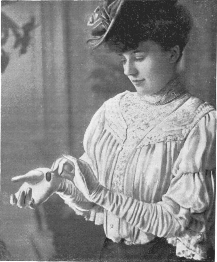 LE BOUTON. Boutonnez, d un geste patient ou les boutons sauteront l'un après l'autre.